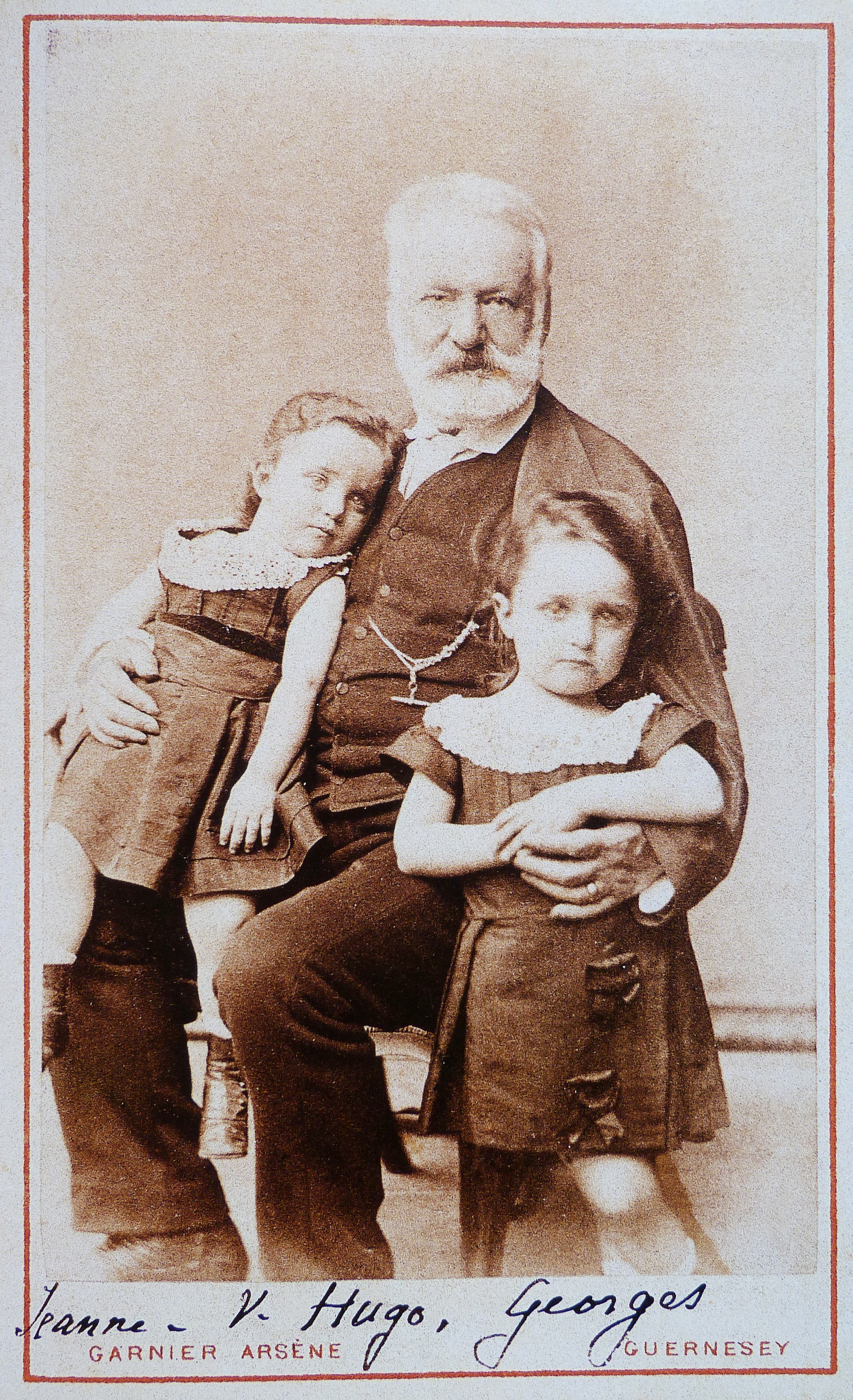 Victor Hugo, Georges et Jeanne, cliché de Arsène Garnier, Guernesey, 1872, 10,2 x 6,3 cm. - Musée Victor Hugo de Villequier, n° Inv 1671 - Reproduit dans Lorsque l'enfant paraît... Victor Hugo et l'enfance, catalogue de l'exposition du même nom tenue au Musée Victor Hugo de Villequier, du 27 avril au 18 août 2002. Direction de publication Evelyne Porel, éditeur Somogy, éditions d'Art, Paris, 2002. - ISBN : 2-85056-531-8 - Photo de la reproduction par Siren-Com.